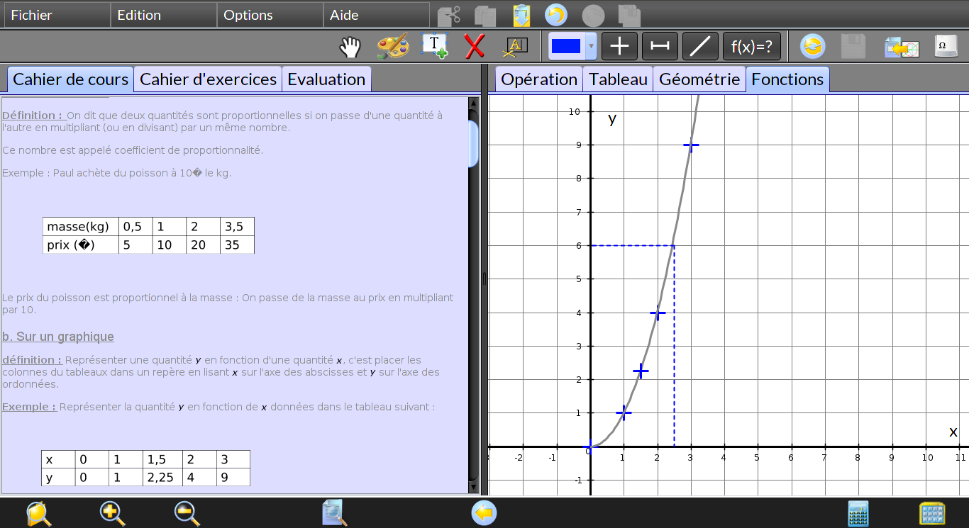 Présentation de l'onglet Fonction de MathEOS